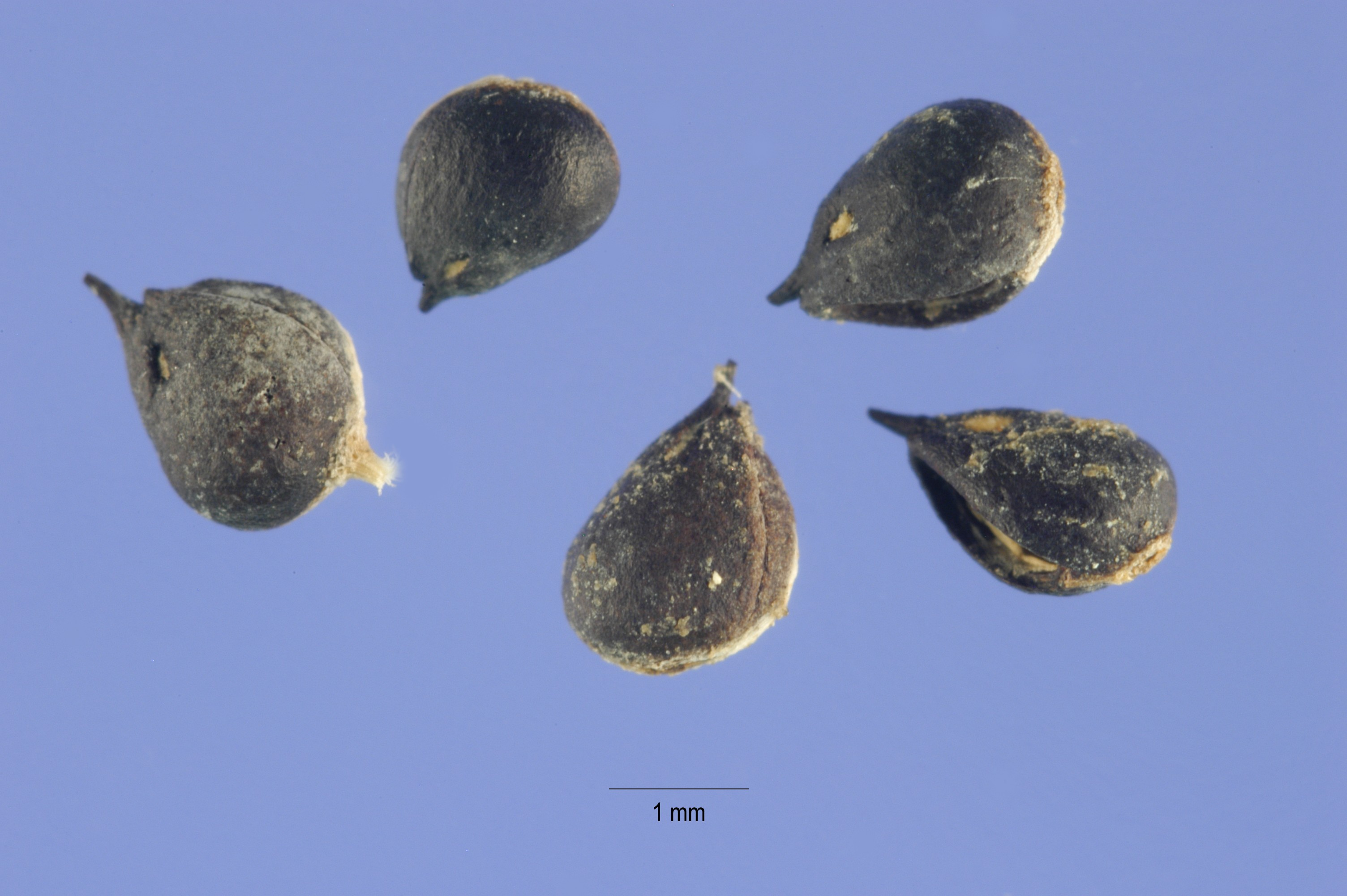 Ruppia maritima fruits